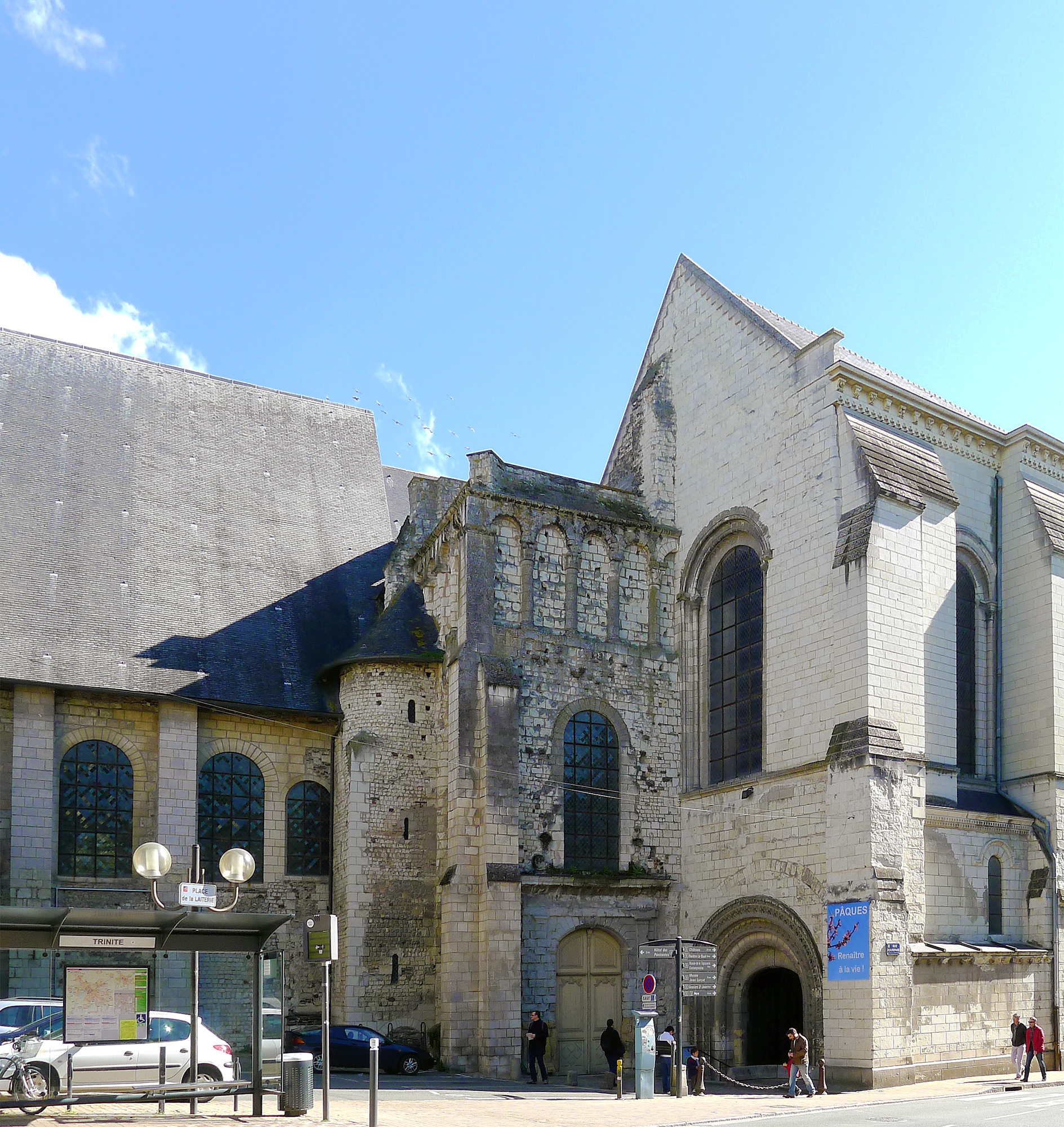 Église de la Trinité d'Angers (enchevêtrement de l'église de la Trinité et de celle de l'abbaye du Ronceray)